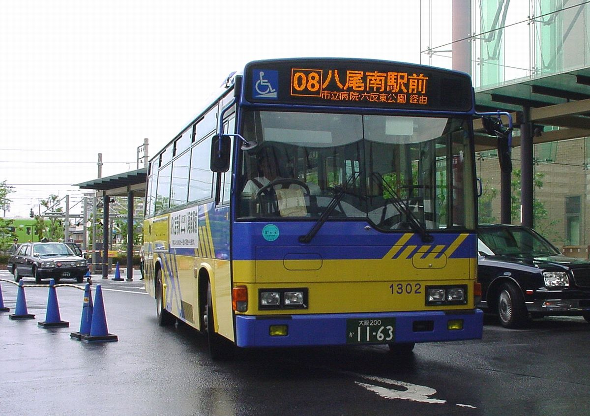 八尾市立病院構内バス停留所（八尾市立病院前）